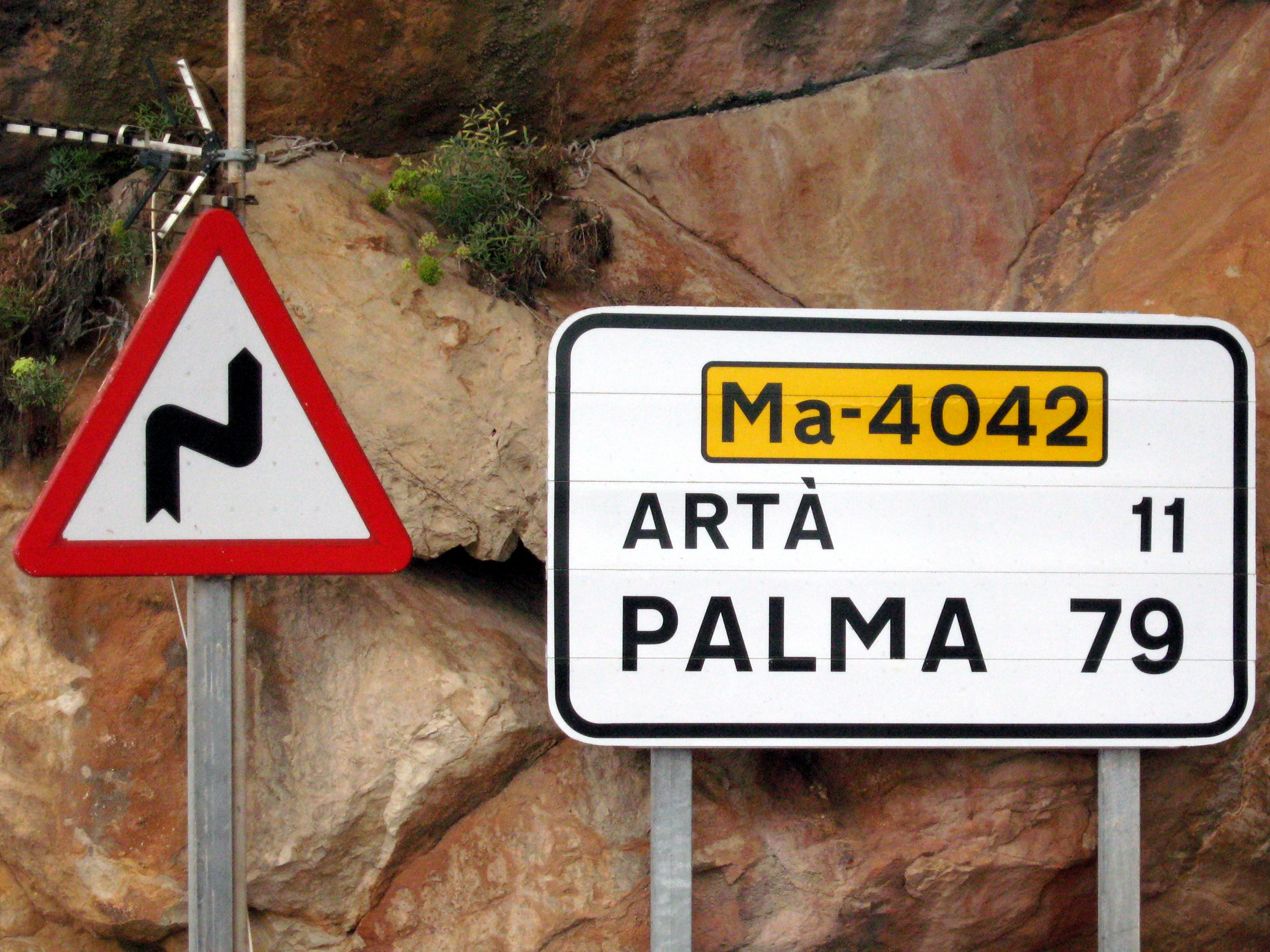 Hinweisschild vor den Coves d’Artà, Gemeinde Capdepera, Mallorca, Spanien